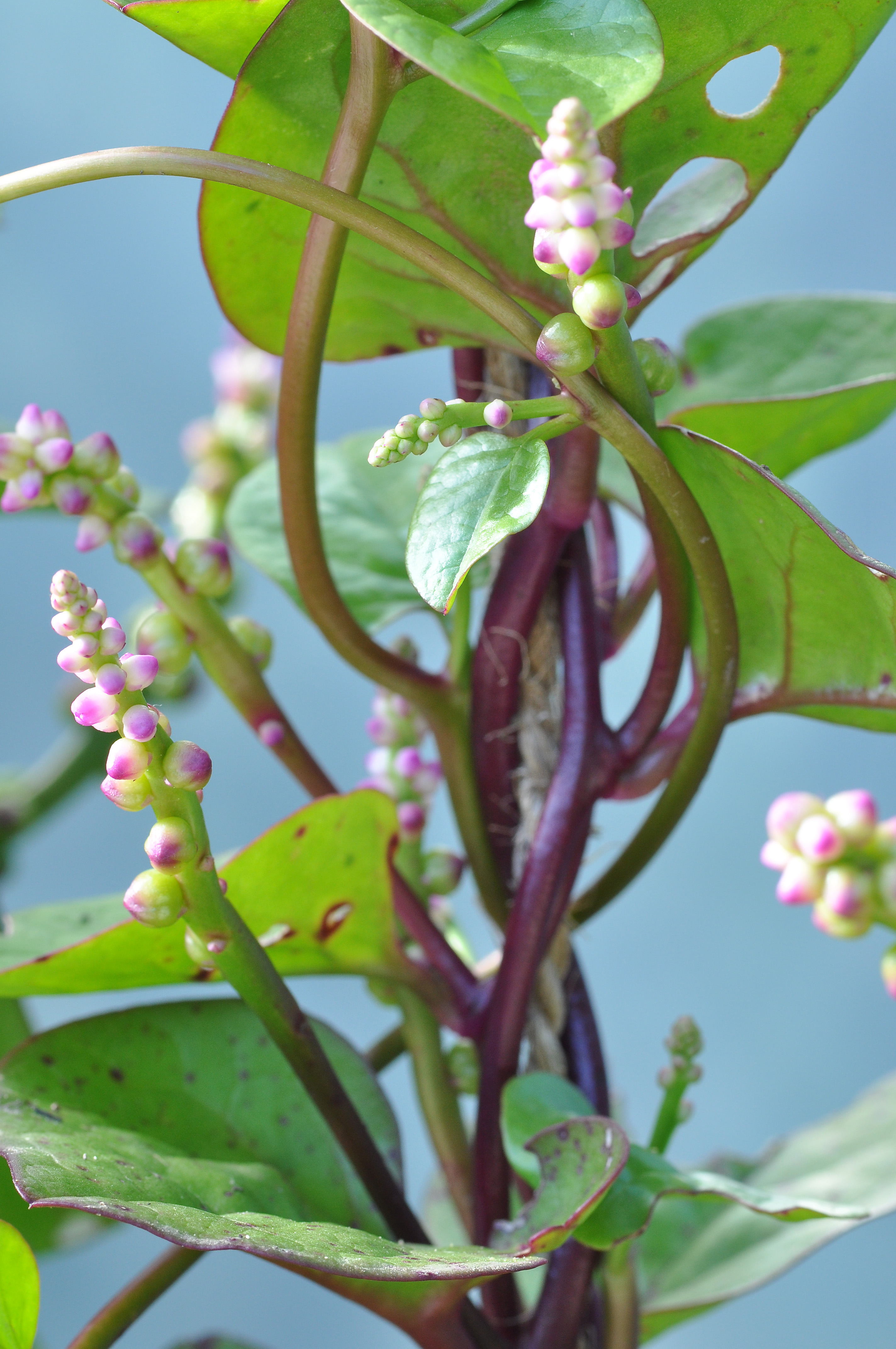 Basella alba -Rubra